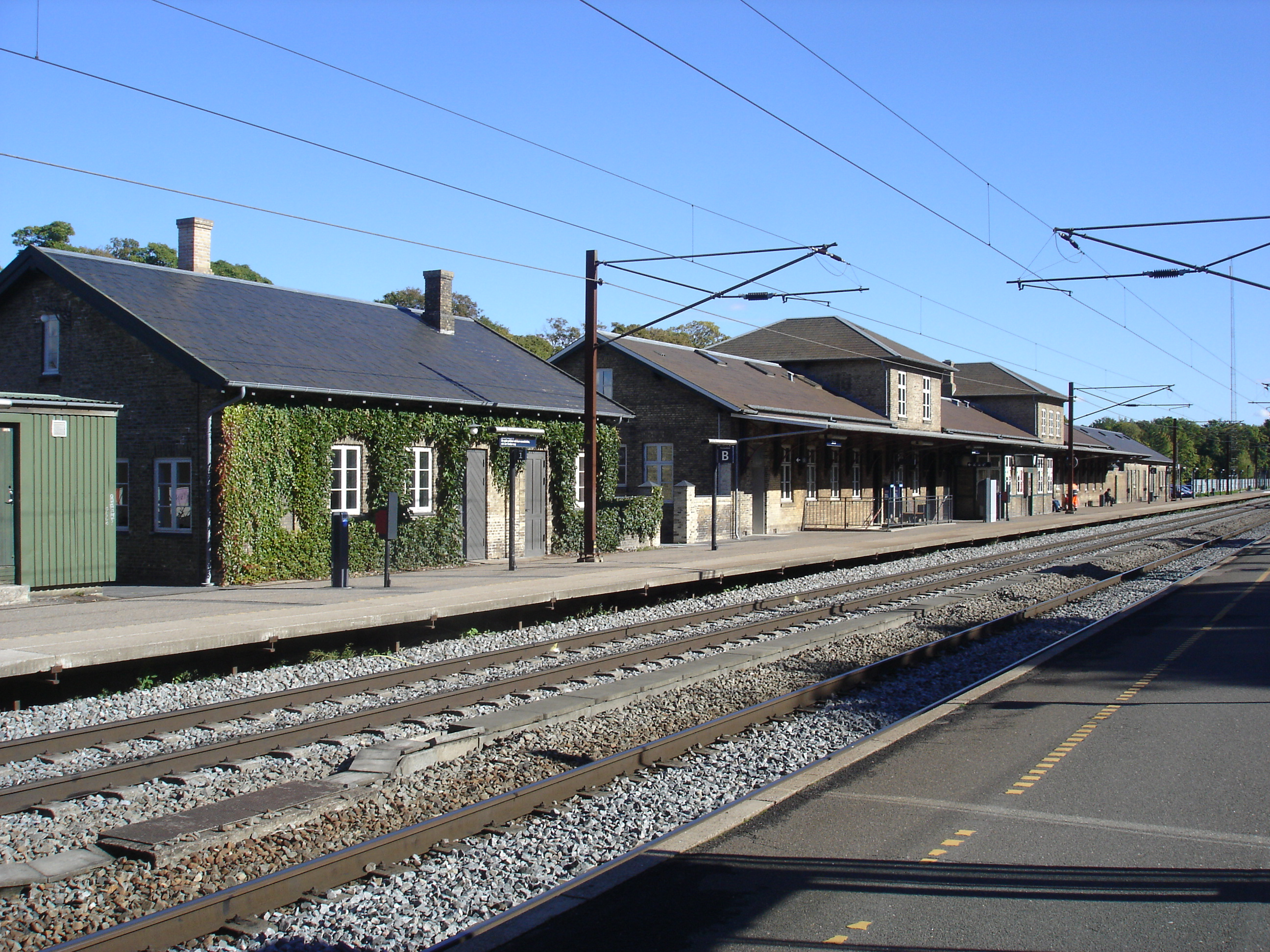 Sorø Station fra sydvest